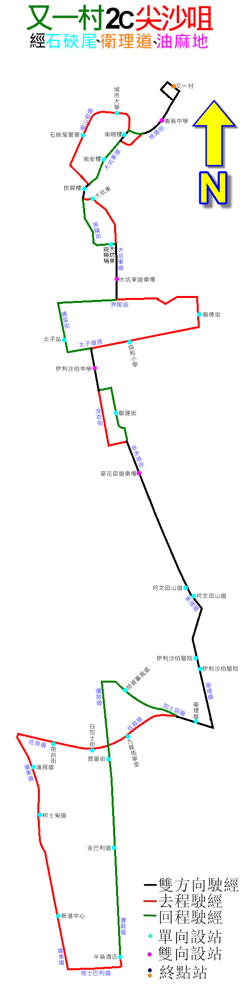 中文（香港）: 九巴2C線的走線圖(2014年1月取消前)